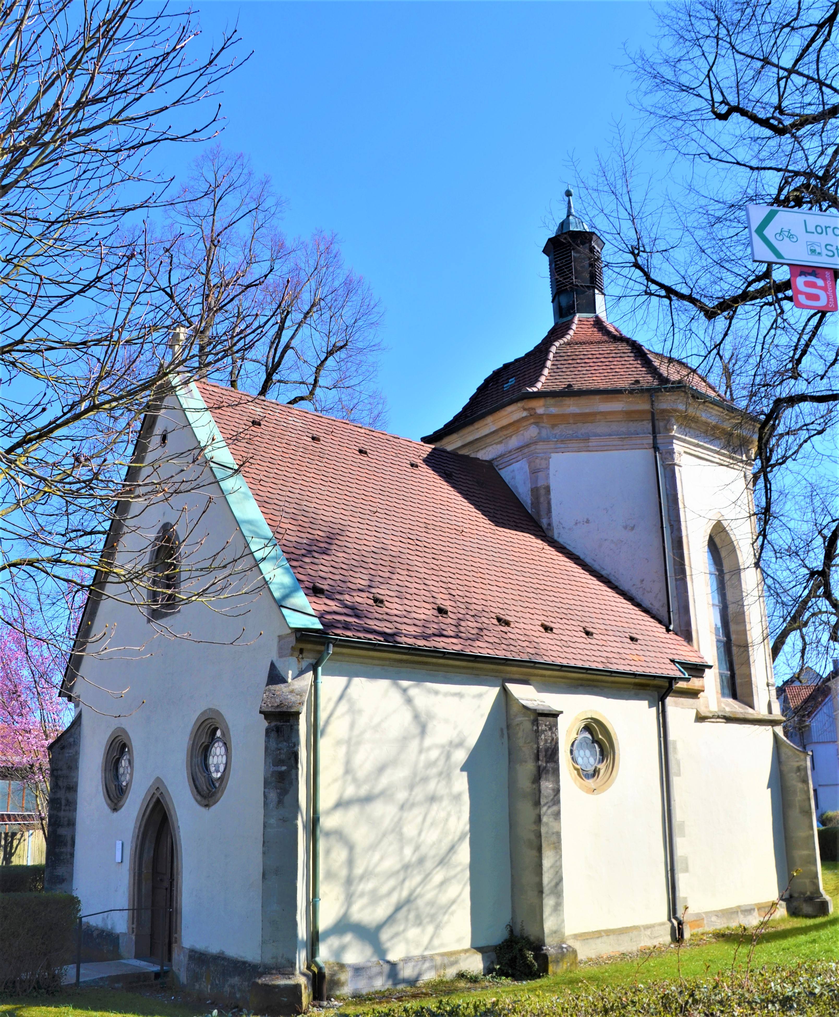 Josefskapelle in Schwäbisch Gmünd von Südwest